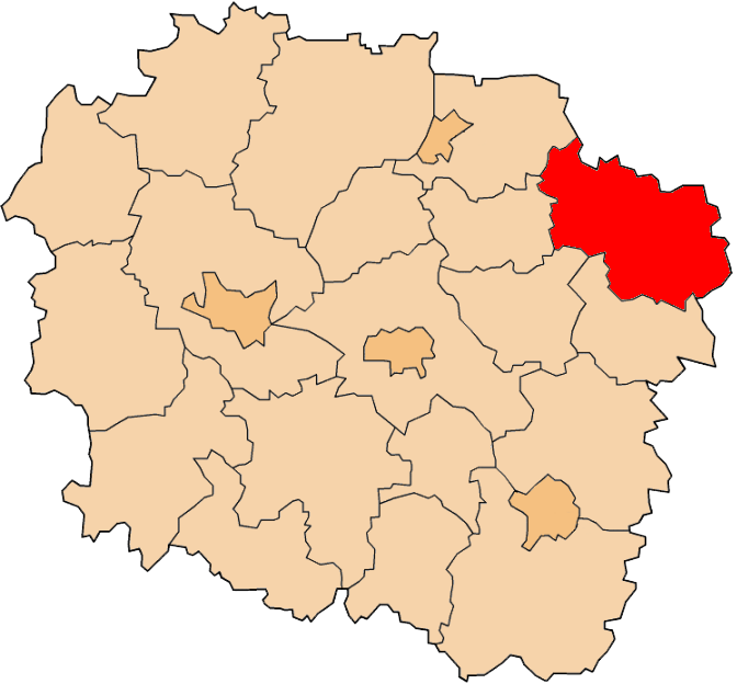 Powiat brodnicki na mapie województwa kujawsko-pomorskiego.